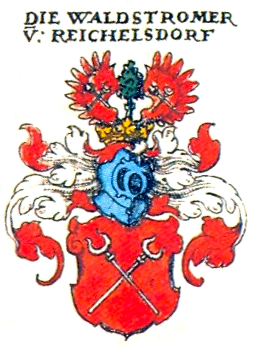 Wappen der Bamberger und Nürnberger Patrizierfamilie Waldstromer von Reichelsdorf . Die Waldstromer waren auch im fränkischen Adel immatrikuliert.